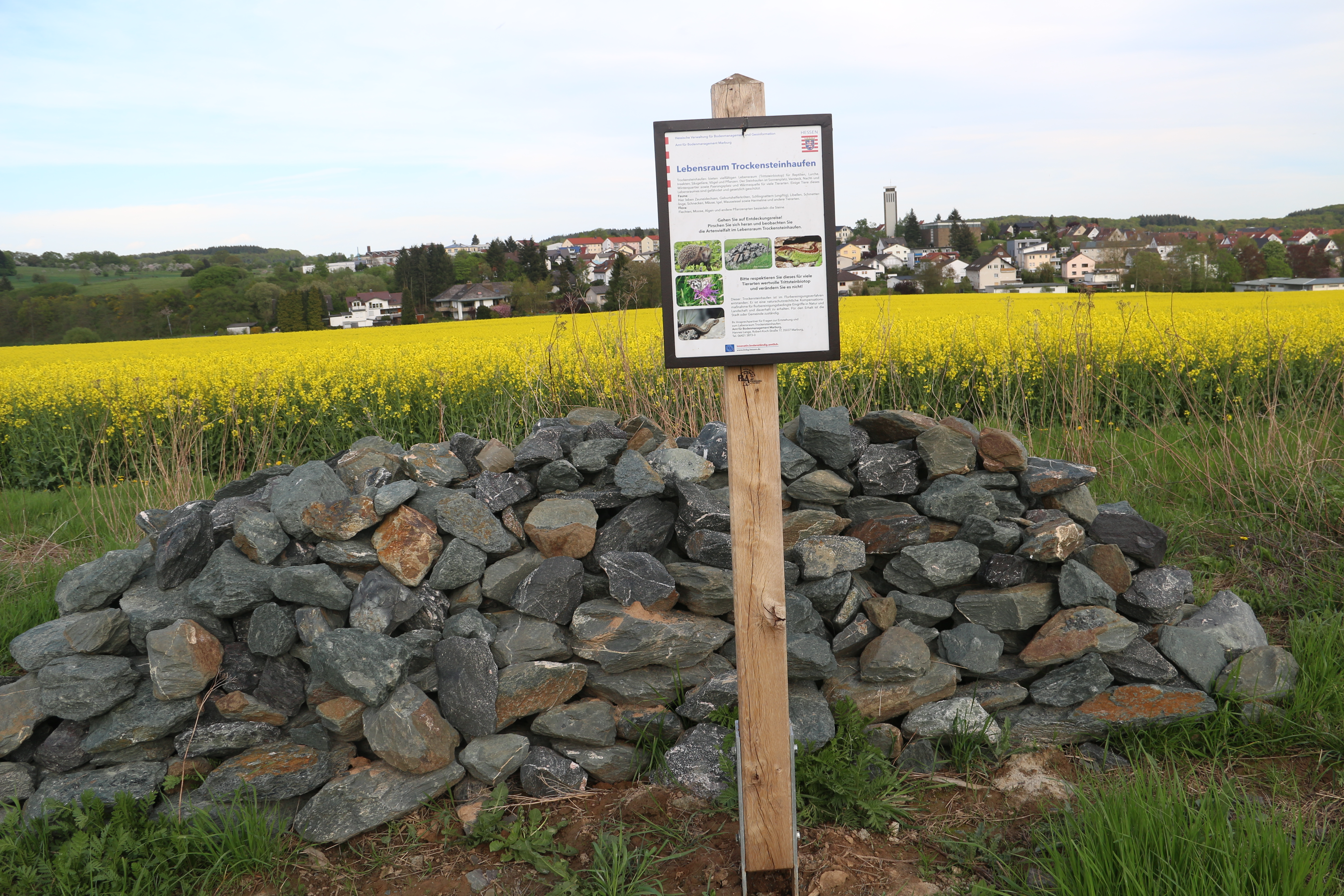 Trockensteinhaufen